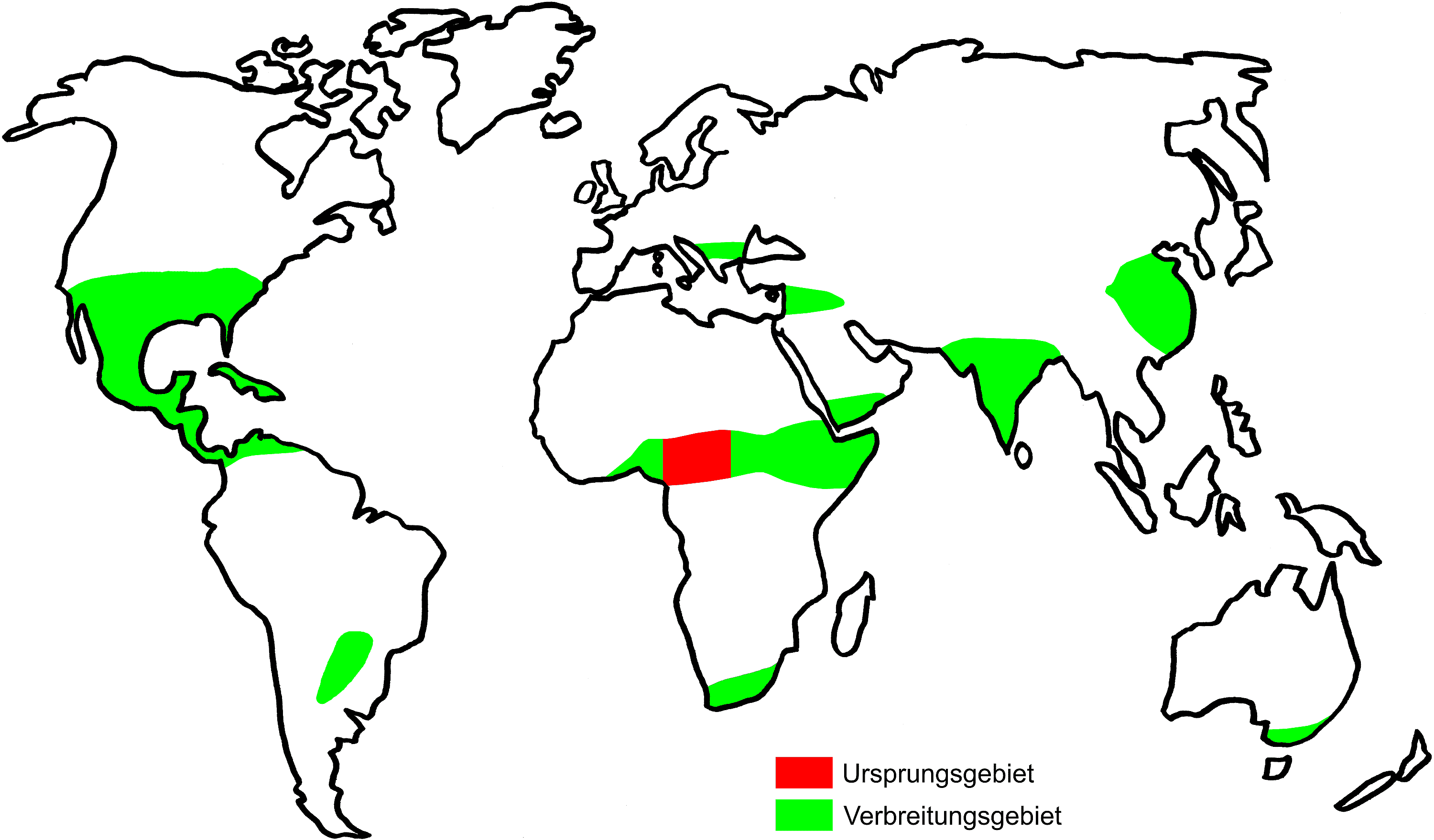 Ursprung und Verbreitung von Sorghum